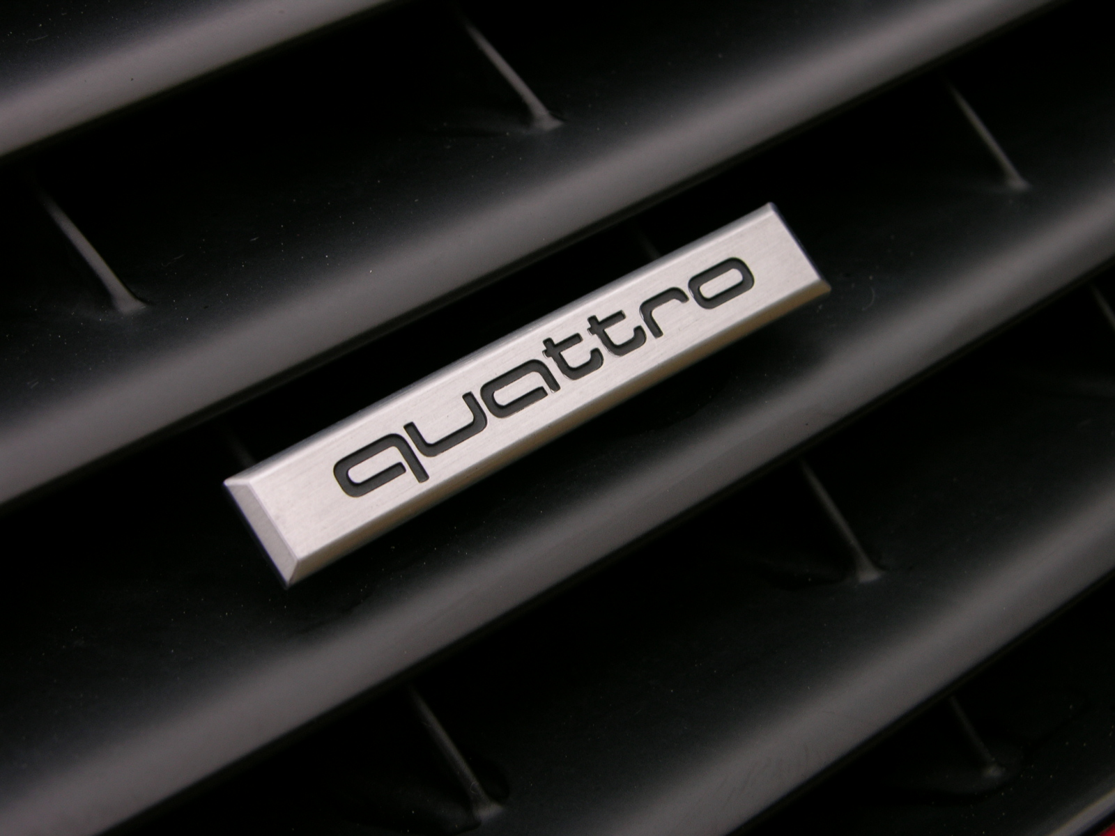 Audi TT 225 Roadster 2001 Misano Red